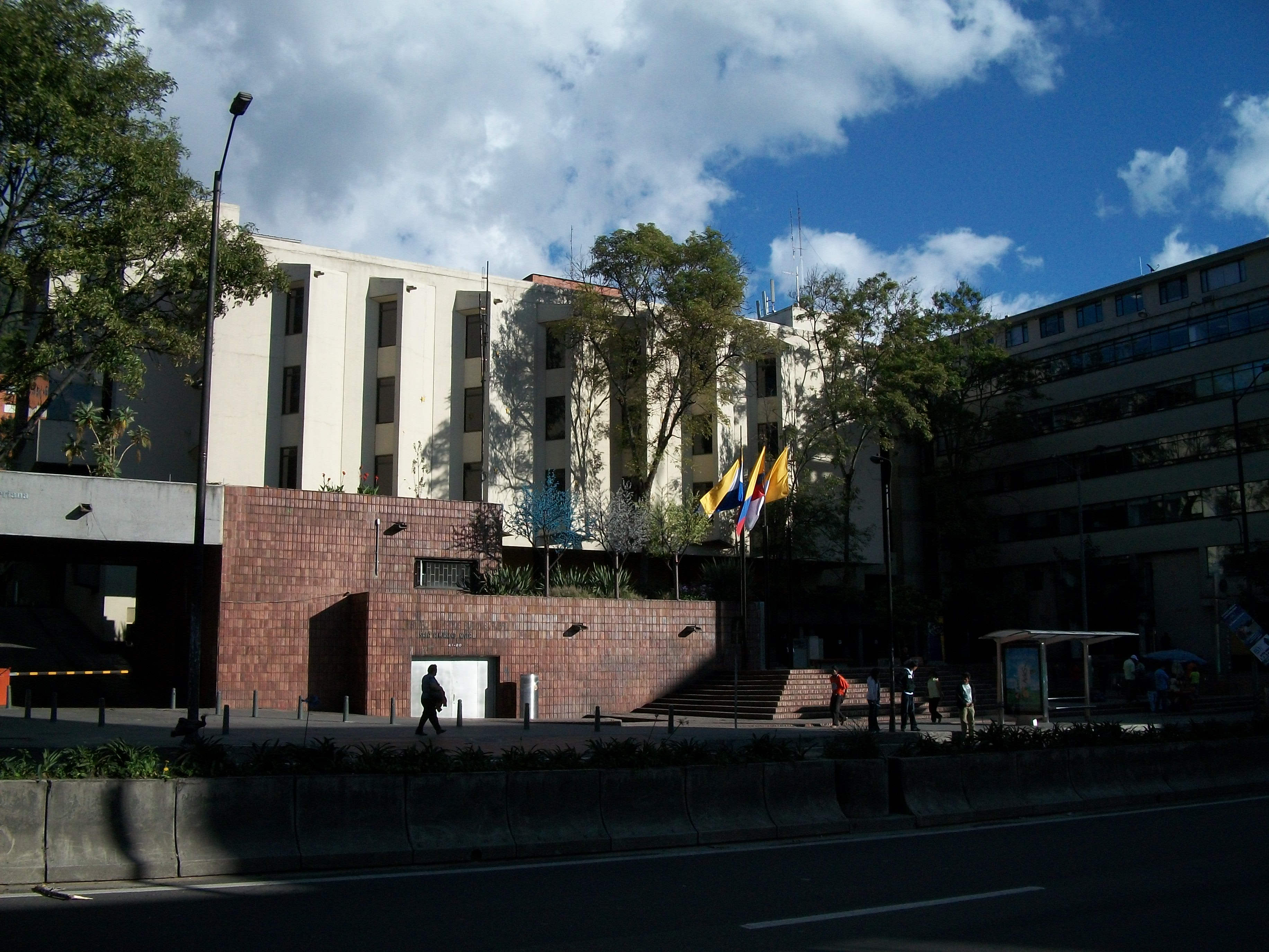 Estrada principal de la universidad Javeriana. Carrera S´petima, Bogotá.